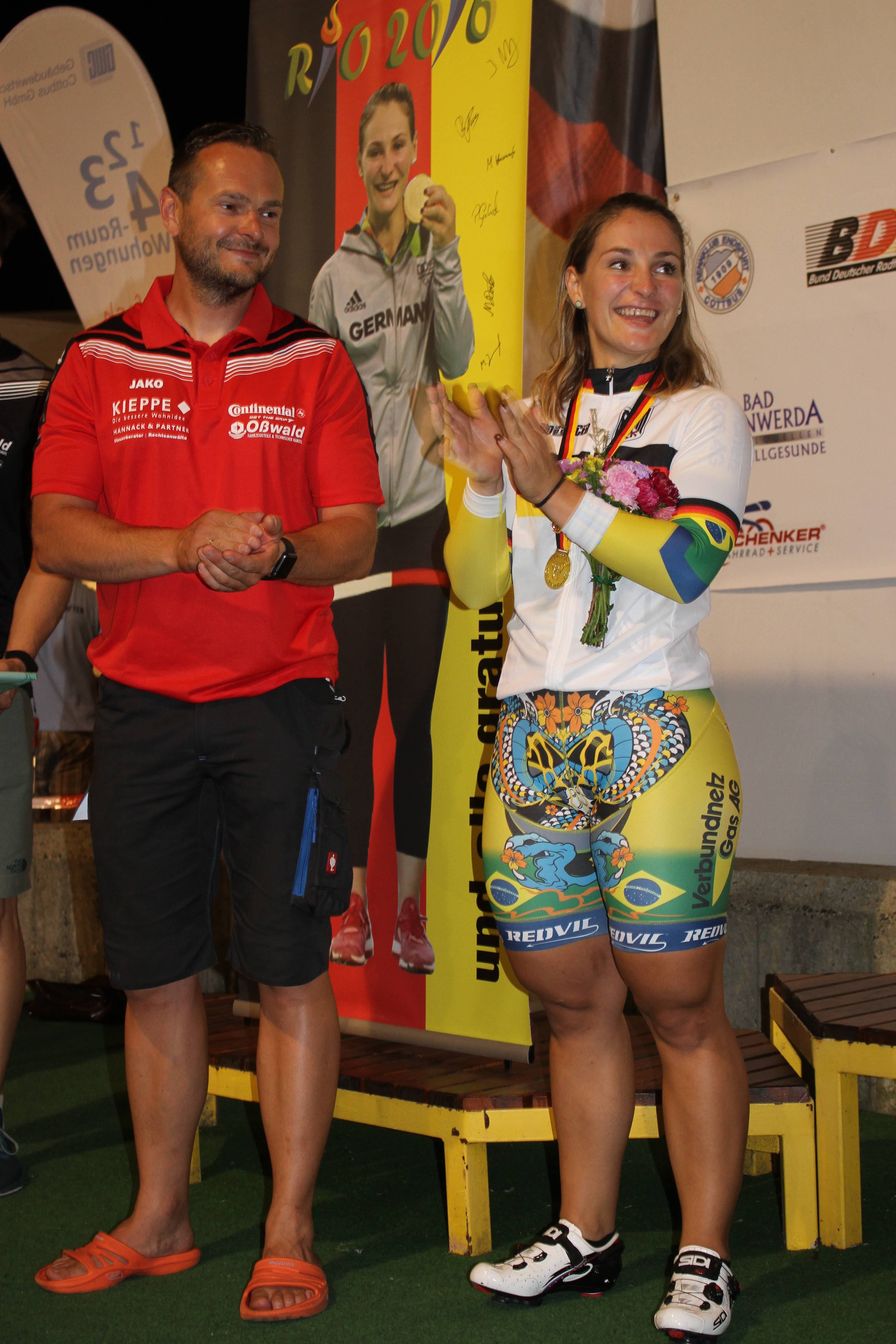 Kristina Vogel mit ihrem Trainer Tim Zühlke